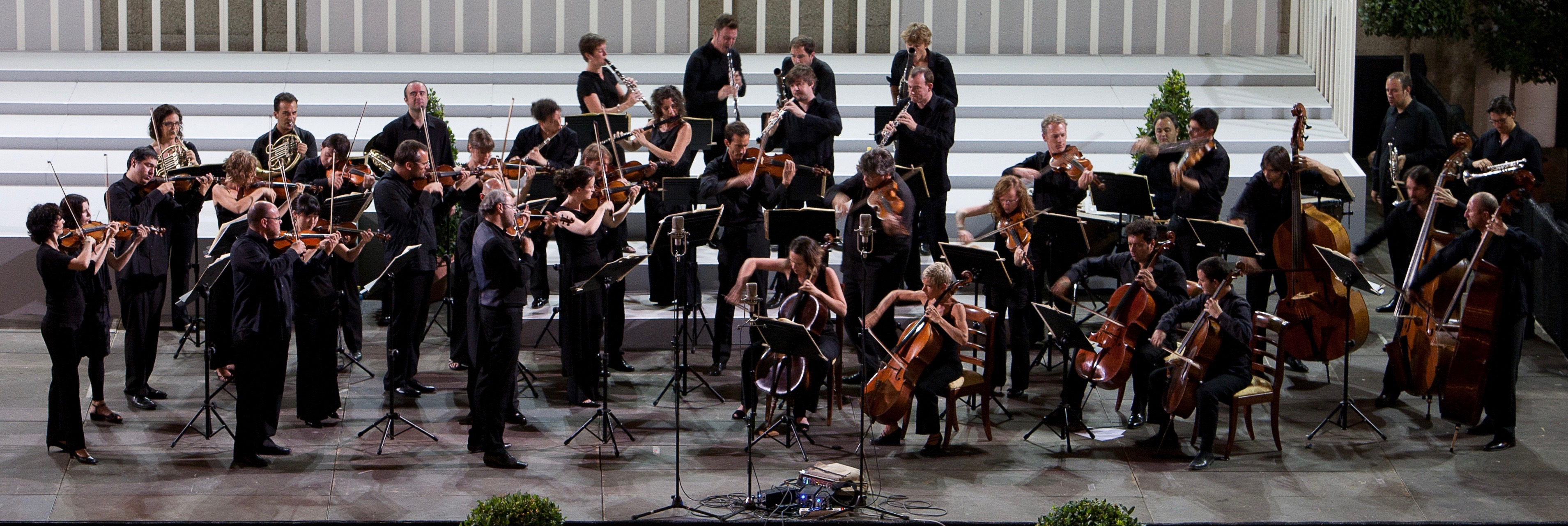 Orquesta BandArt en El Escorial. Ciclo de música al aterdecer de Patrimonio Nacional